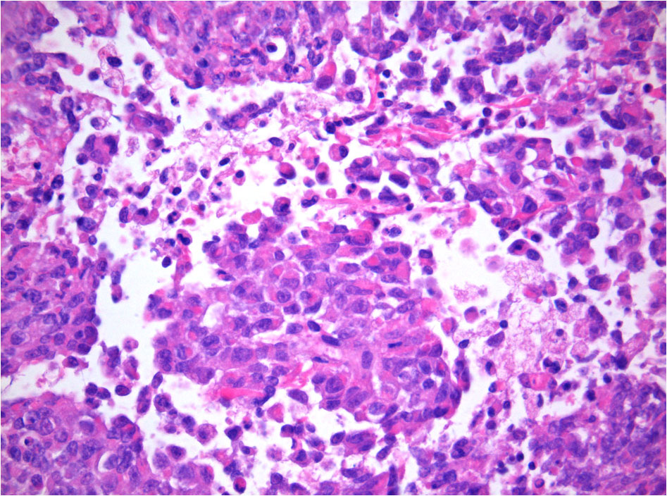 Histologie des ATRT. Überblick. HE-Färbung. Supratentorial atypical teratoid/rhabdoid tumor (ATRT)